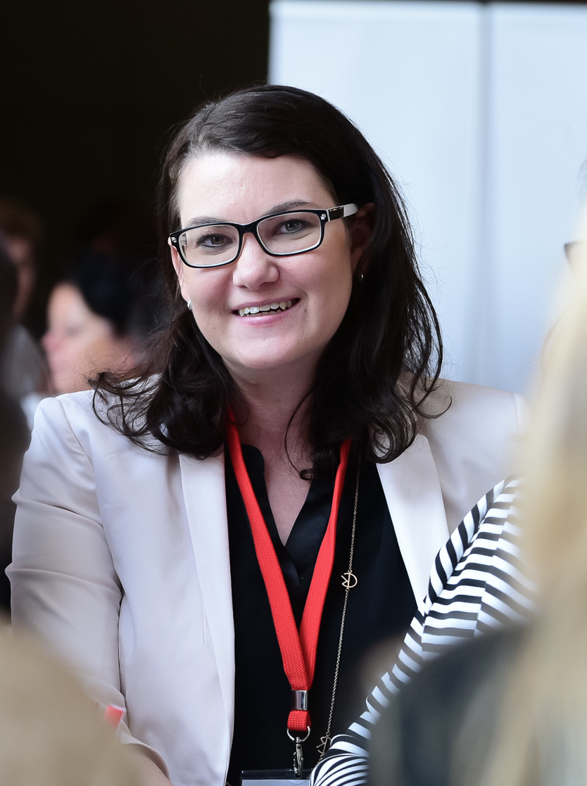 Tagung Brauchen Frauen mehr Stadt am Land?